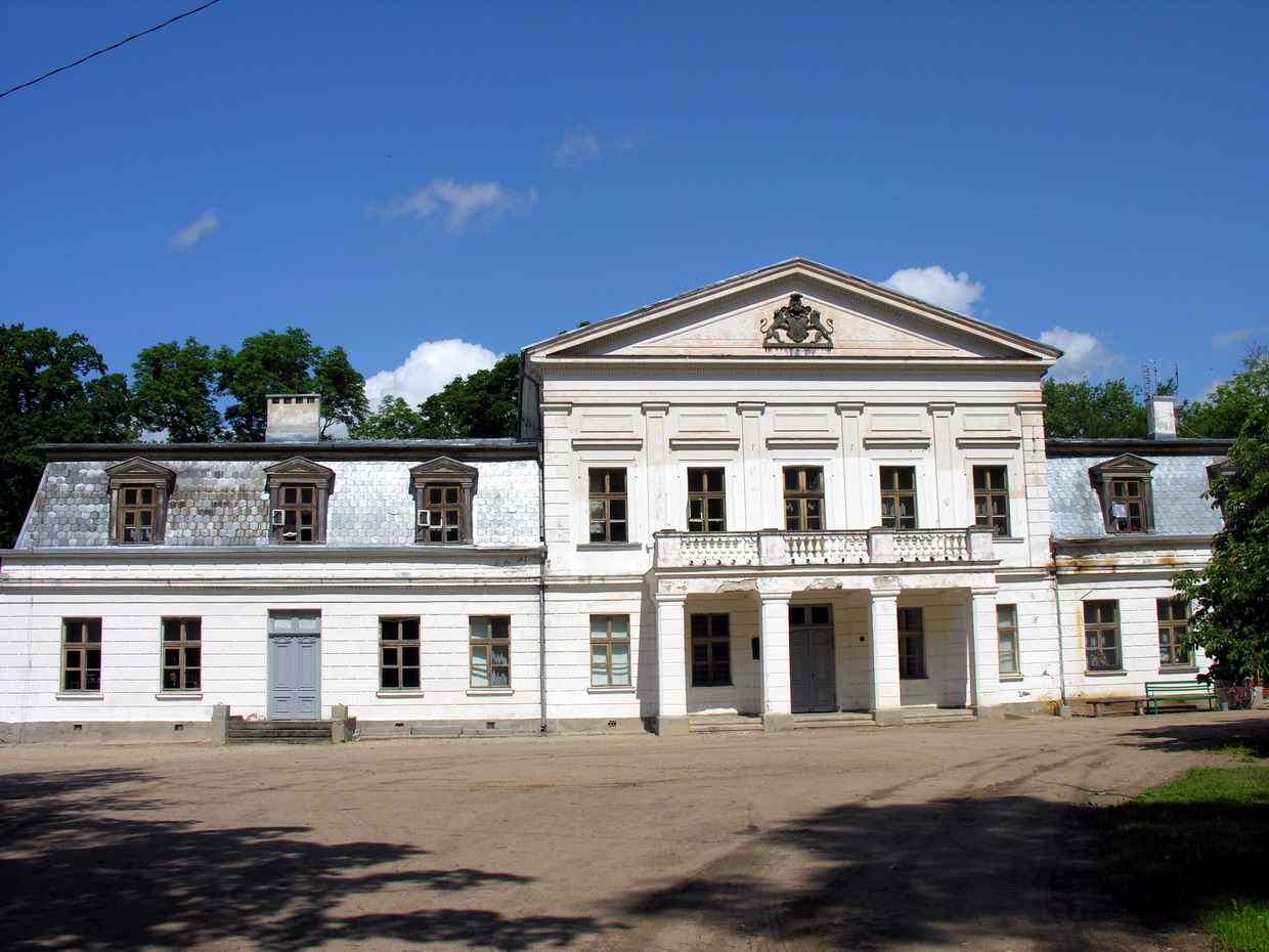 Žagarės regioninis parkas: Žagarės dvaras